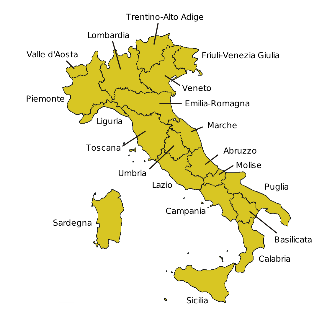 Beschreibung: Beschriftete Karte der italienischen Regionen Quelle: Bild:Regionen in Italien.png bearbeitet mit CorelDraw Bearbeiter: Stephan Brunker Lizenz: GNU FDL